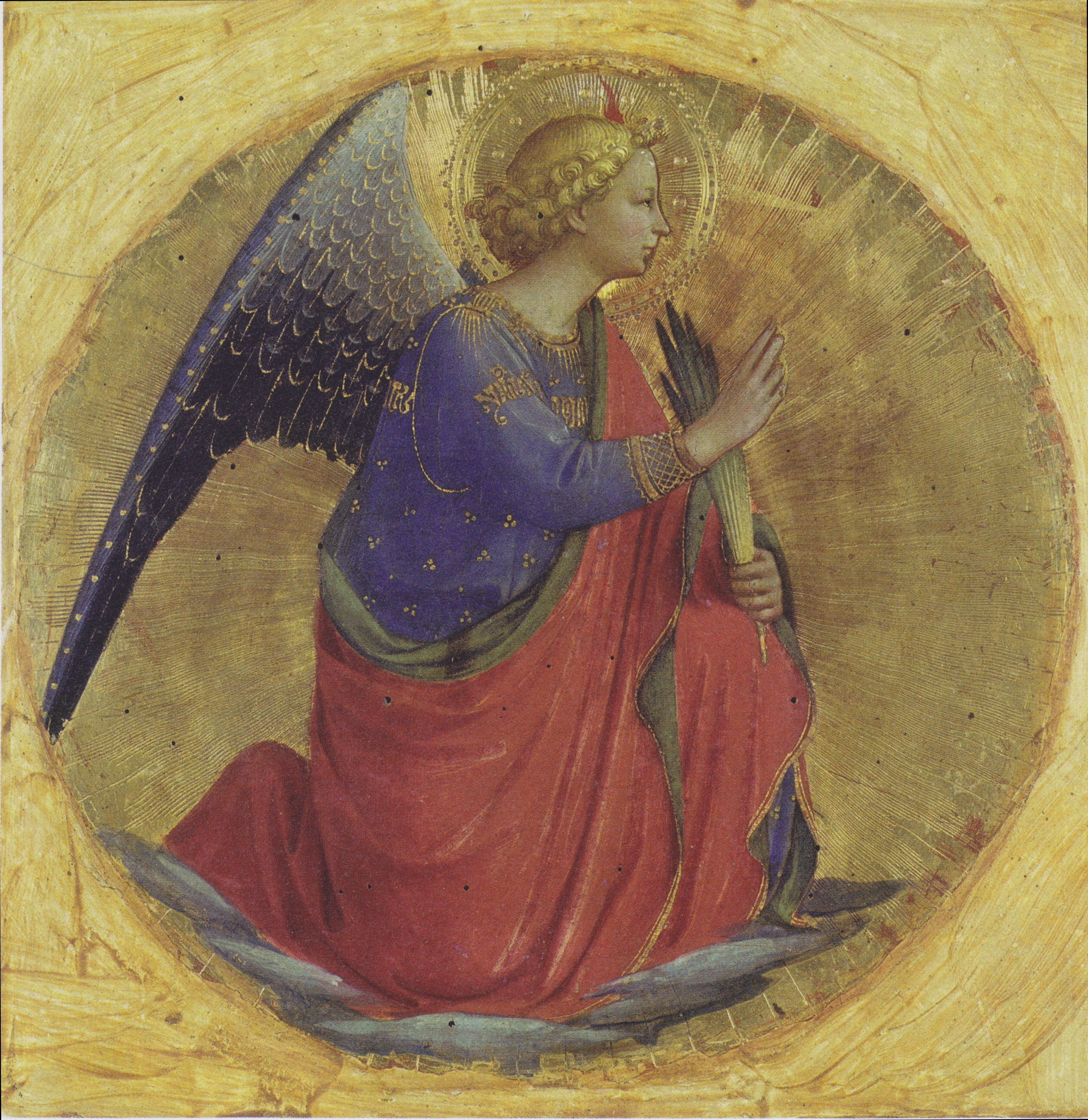 Polittico Guidalotti (Madonna con Bambino in trono e angeli, San Domenico e san Nicola di Bari, San Giovanni Battista e santa Caterina d'Alessandria, Annunciazione, Santi, Storie della vita di san Nicola di Bari)